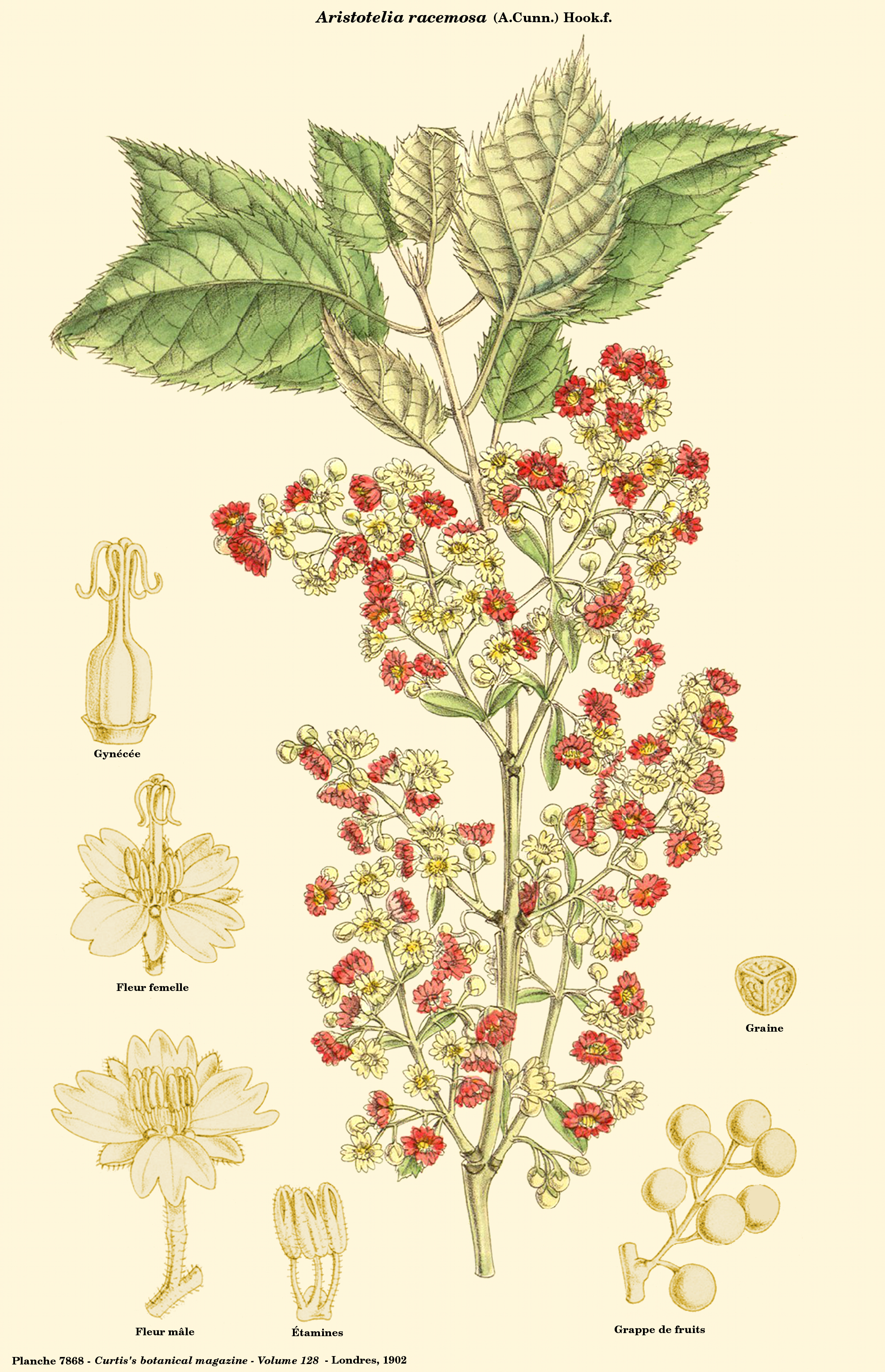 Aristotelia racemosa - Planche 7868 du volume 128 du Curtis's botanical magazine - Planche reprise sous Gimp par D. Prévôt